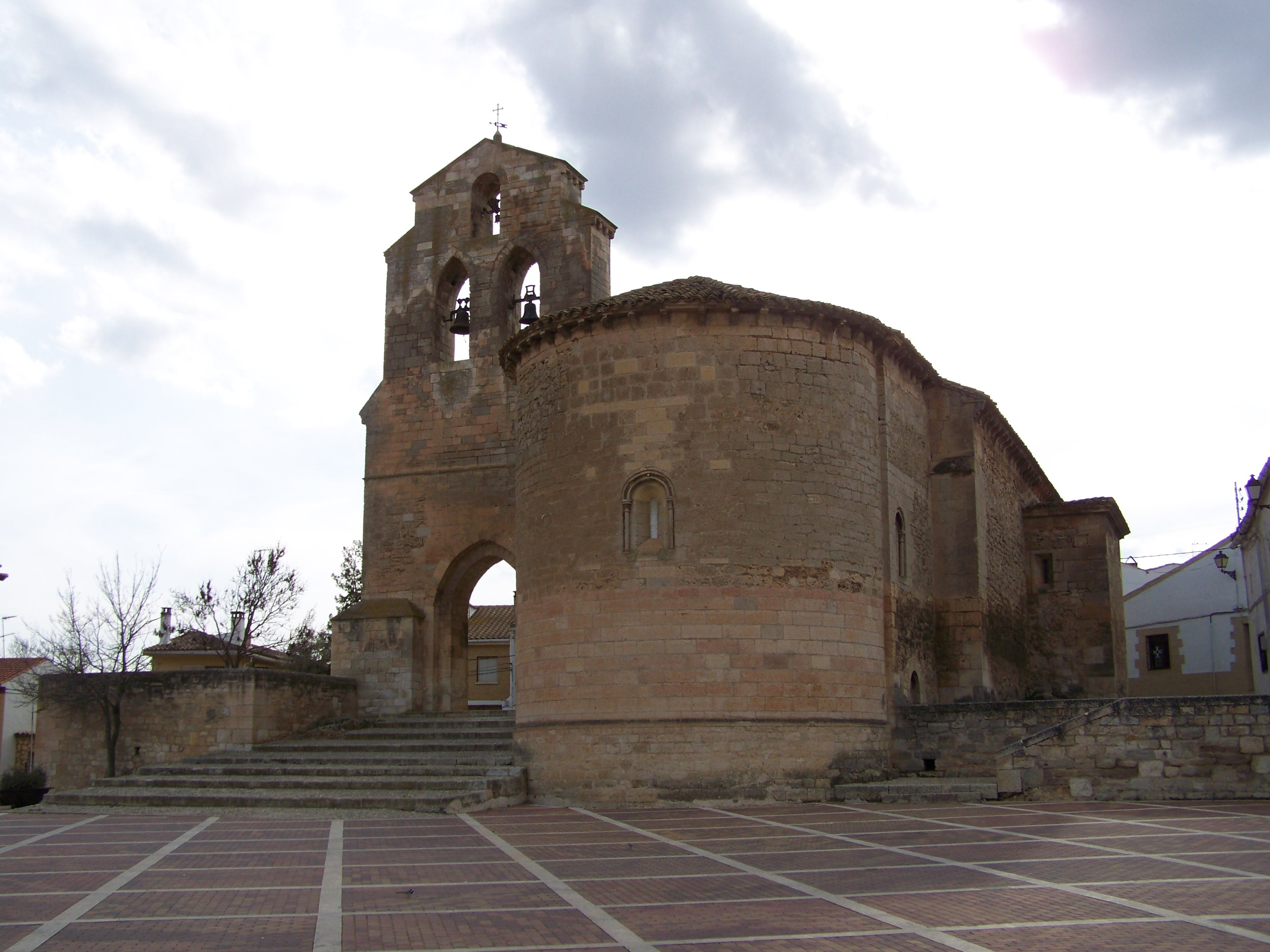 Arcas del Villar (Cuenca, España) - Iglesia románica de Nuestra Señora de la Natividad (S. XIII)